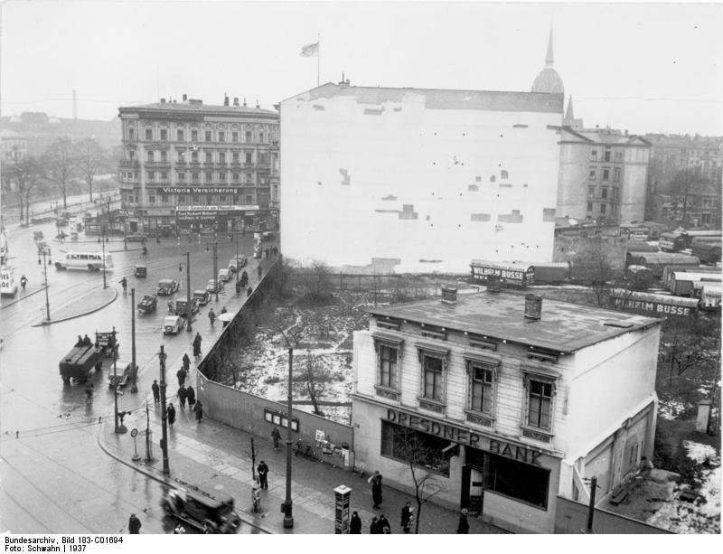 Scherl Bilderdienst: Rathausbau für das Bezirksamt Kreuzberg Blick auf den Bauplatz am Blücherplatz (Hall. Tor.) [Hallesche Tor] phot. Schwahn Information added by Wikimedia users. Ergänzung: Dieser Stadtbereich hat nach den Kriegszerstörungen und der Veränderung der Straßenführung in den 1970er-Jahren heute ein ganz anderes Aussehen. Vorne mündet die Belle-Alliance-Straße (heute: Mehringdamm, aber mit veränderter Straßenführung) auf den Blücherplatz, darüber die Blücherstraße. Links oben sieht man das Waterloo-Ufer entlang des Landwehrkanals, rechts im Hintergrund den Turm der Heilig-Kreuz-Kirche. Ungefähr am Ort des Hauses mit der weißen Brandmauer steht heute die Amerika-Gedenkbibliothek.